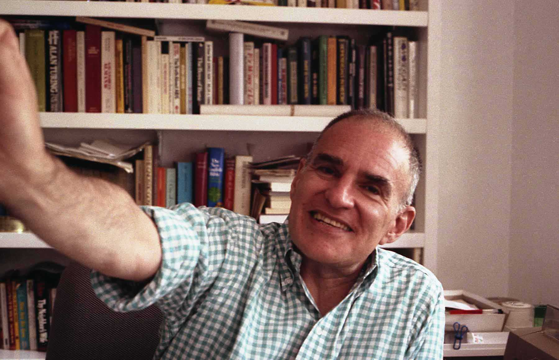 Larry Kramer (born in 1935) in June 1989. Picture by Massimo Consoli. Larry Kramer (nato nel 1935) nel giugno 1989. Foto di Massimo Consoli.